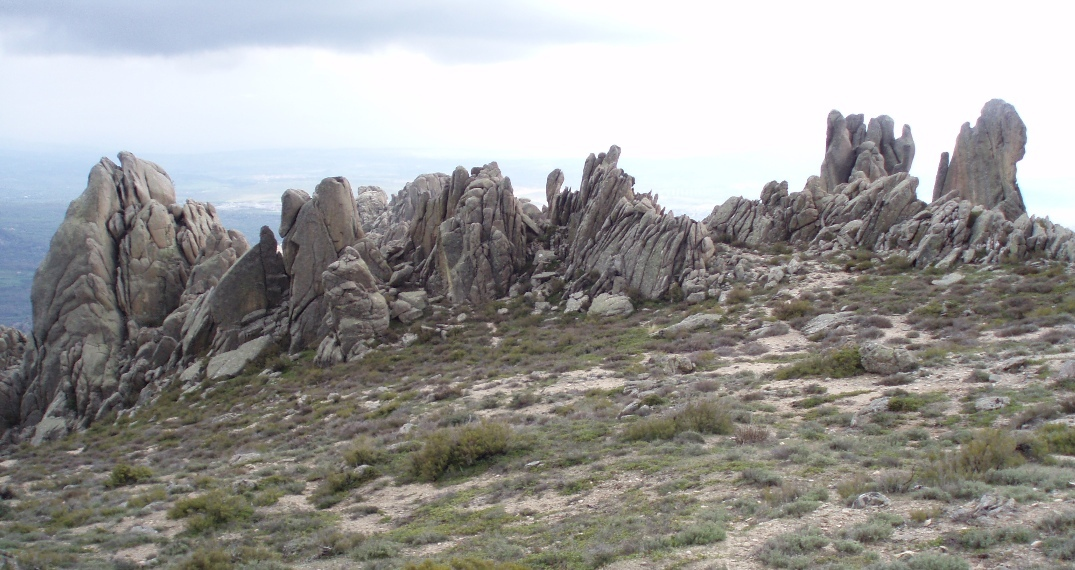 Riscos de las Damas de La Pedriza (Comunidad de Madrid, España).